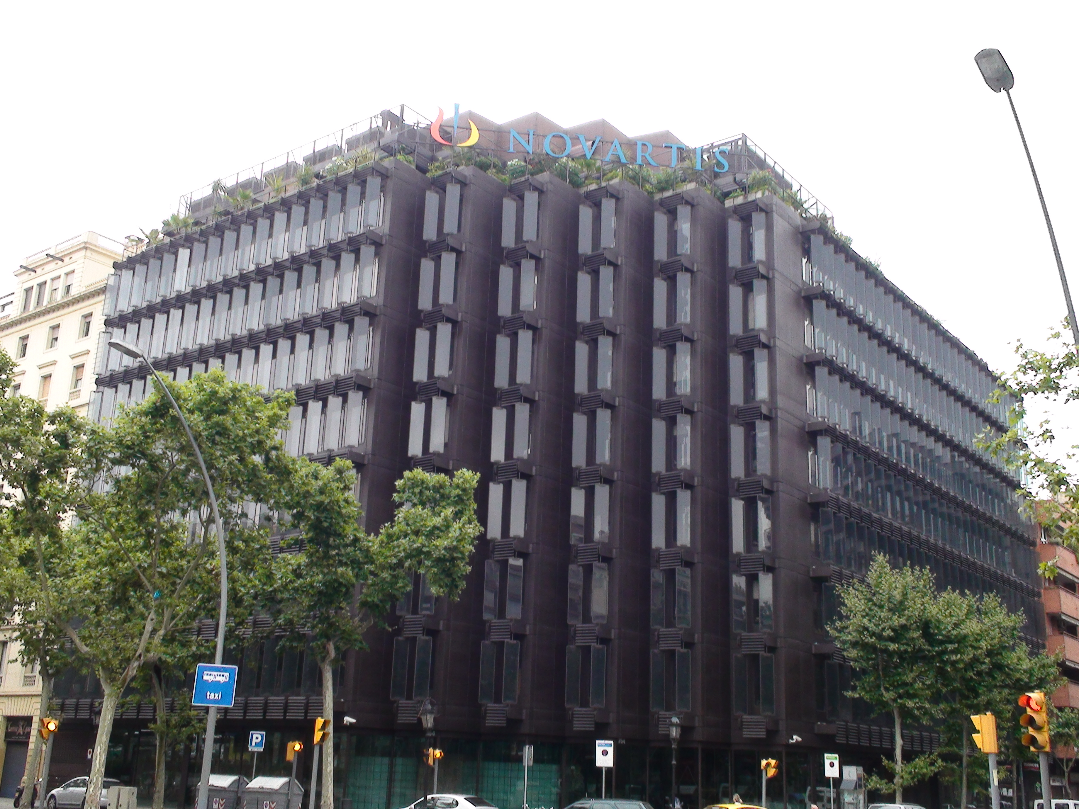 Novartis en Gran Vía Corts Catalanes, 764, Barcelona